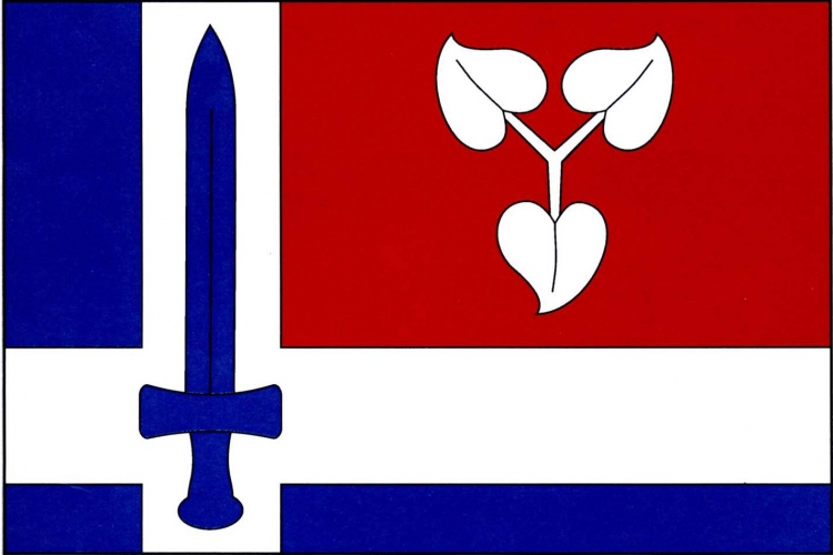 Vlajka, Paračov, okres Strakonice